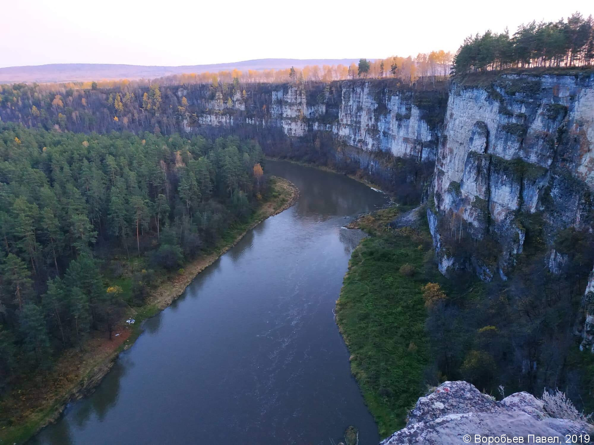 Каменная гряда Большие Притёсы (Челябинская обл.)